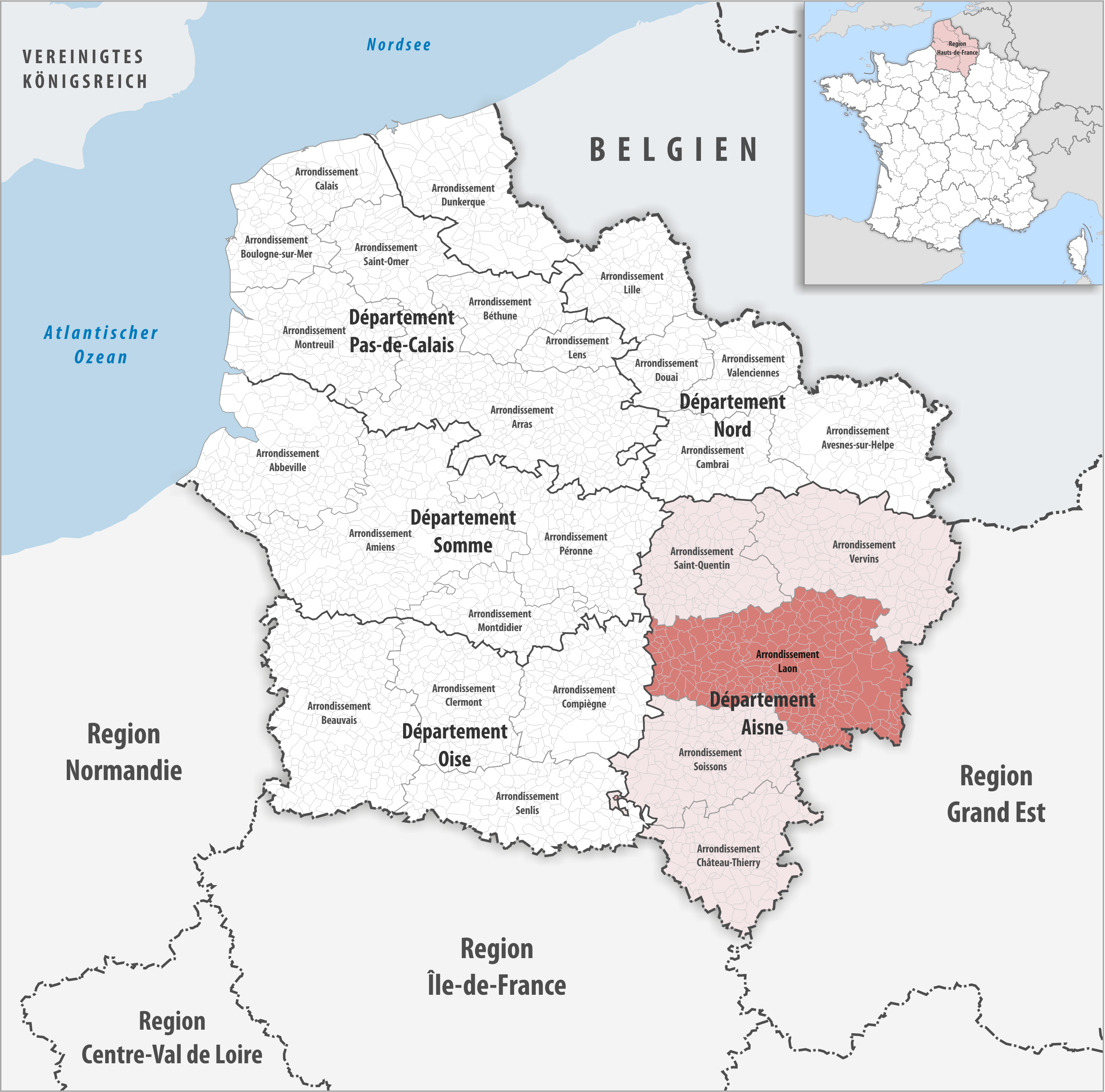 Lage des Arrondissements Laon